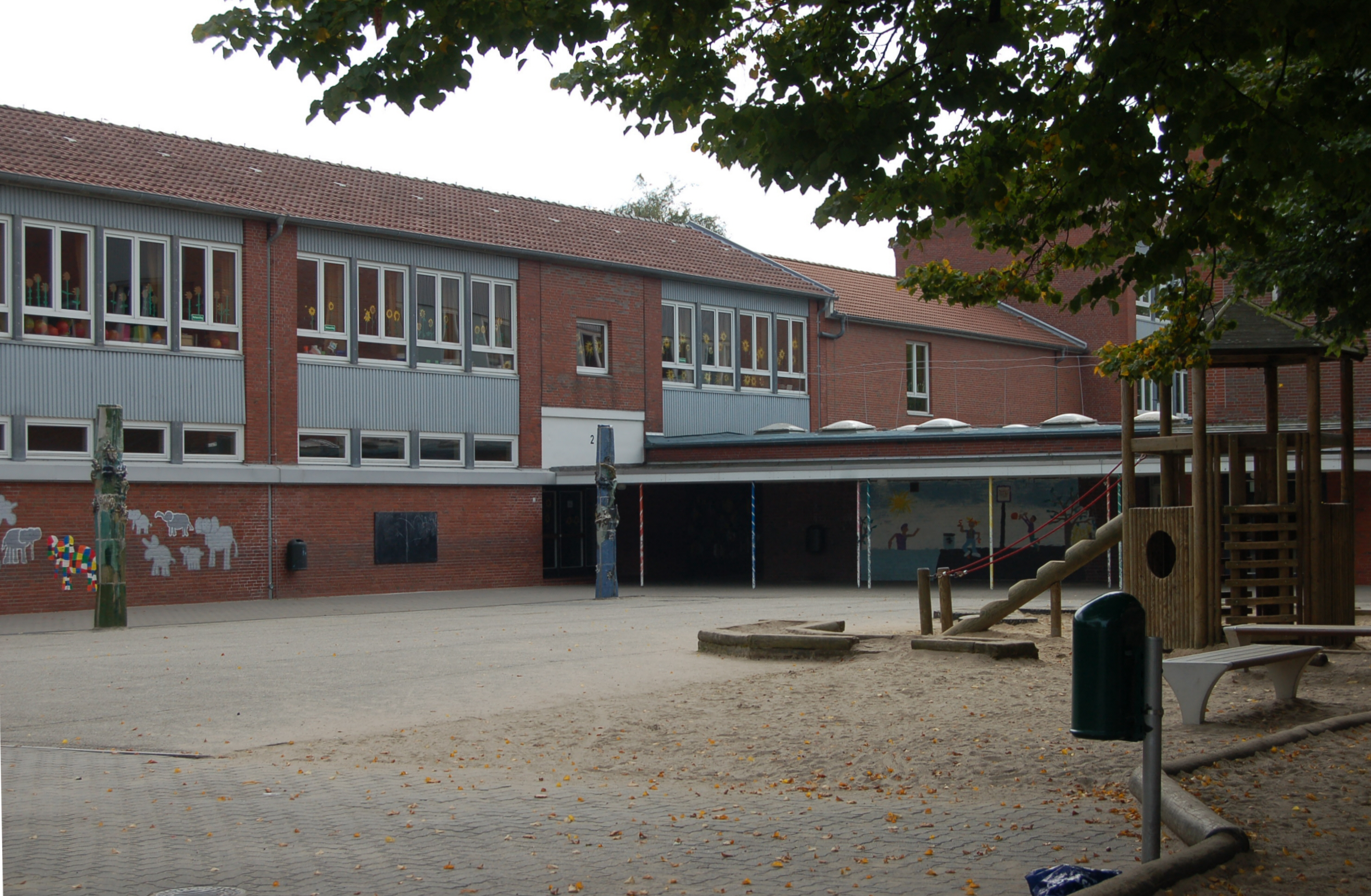 Die Roggenfeld Schule in Uetersen (Kleiner Schulhof)